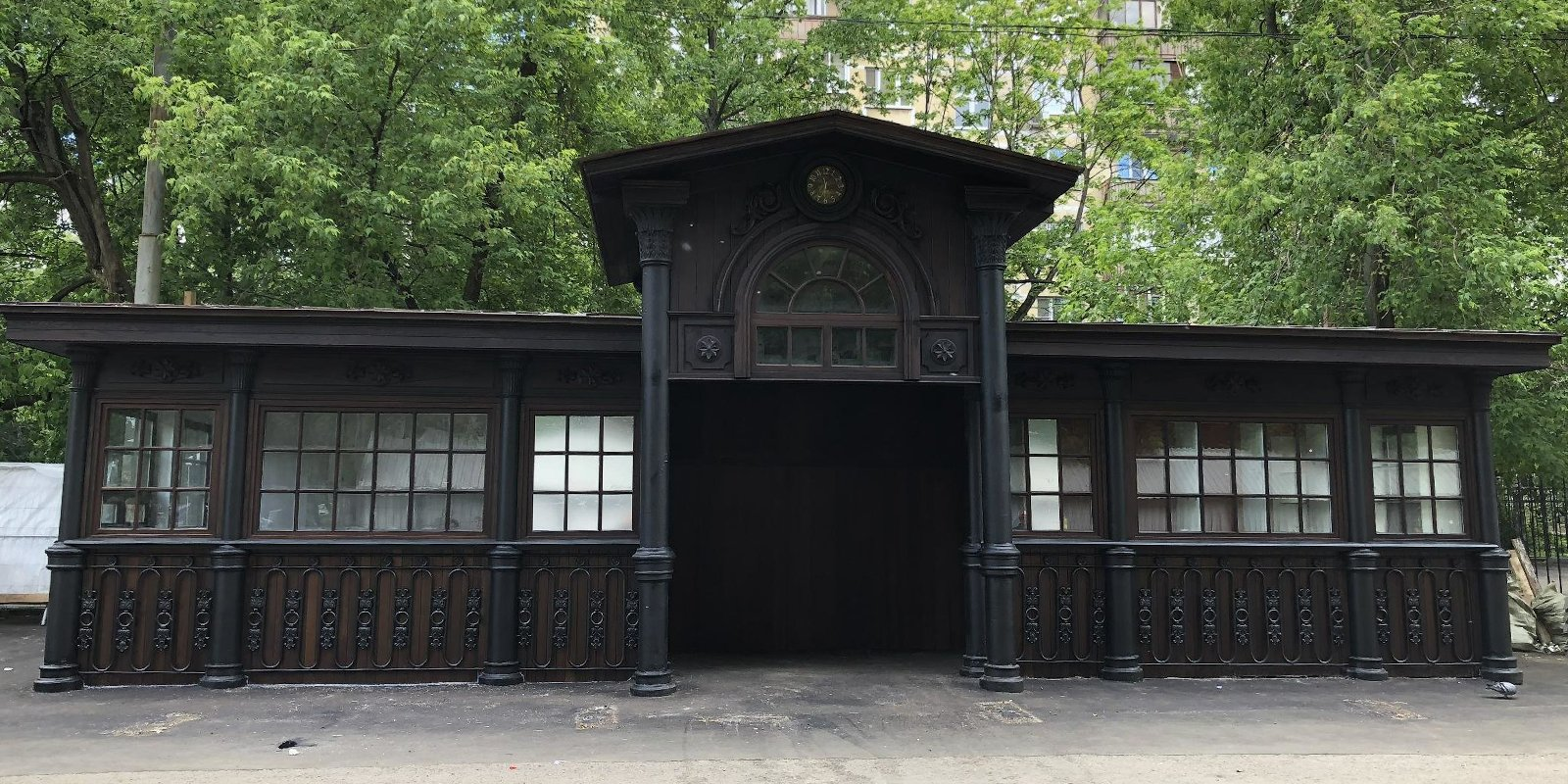 Остановка «Красностуденческий проезд» после реставрации в 2018 году. Павильон является памятником культурного наследия города Москвы и редким сохранившимся образцом промышленного дизайна первой трети XX века